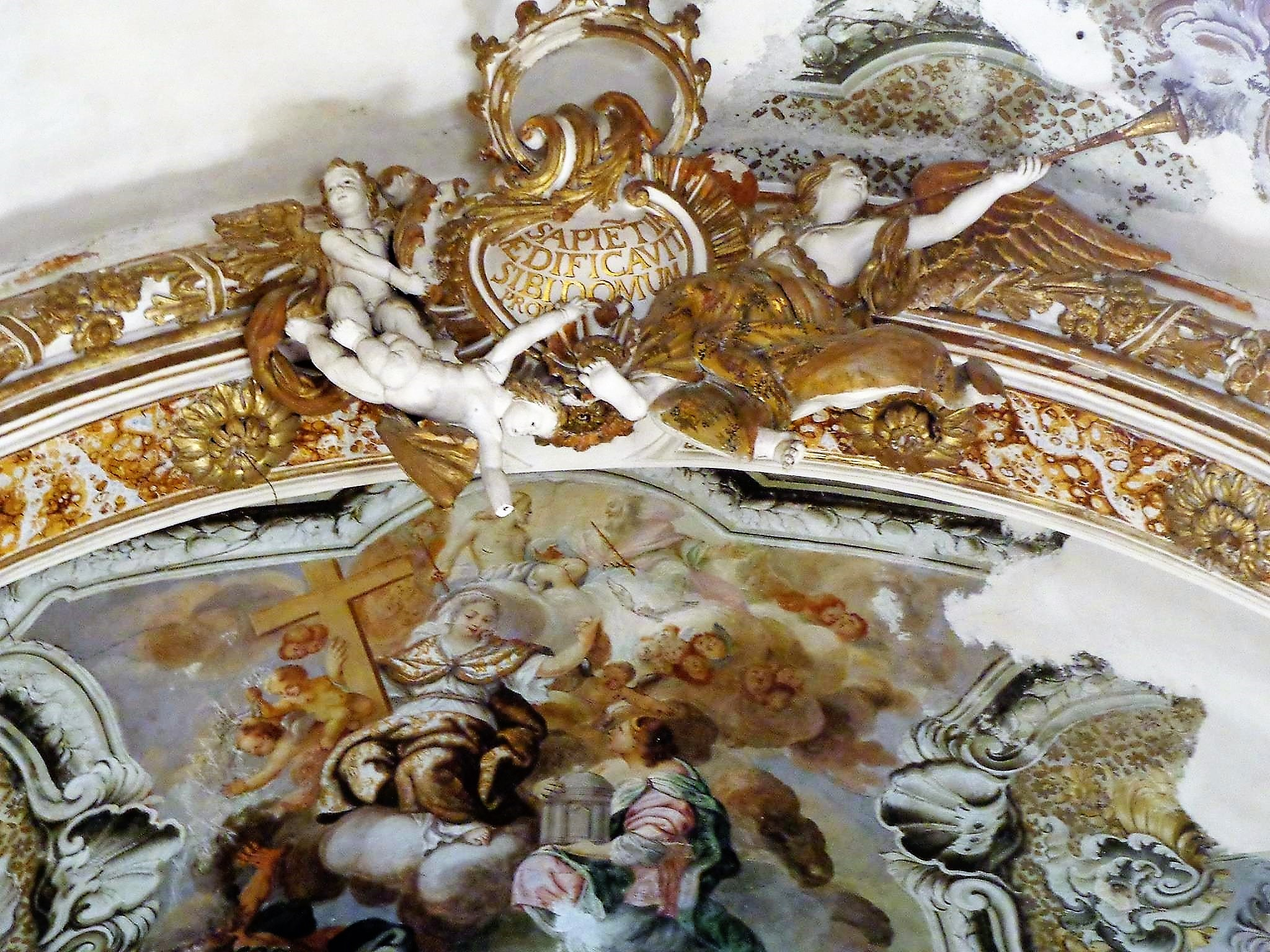 Stucchi volta dettaglio, foto già presente su account personale FB